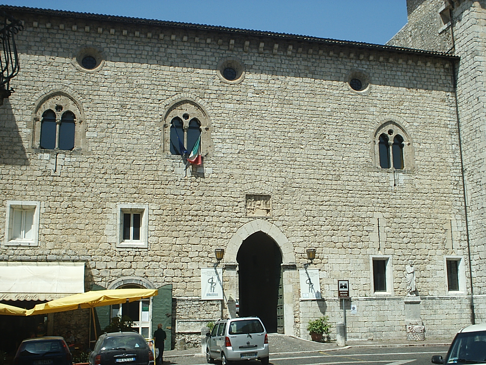 Palazzo ducale-Cantelmo di Atina